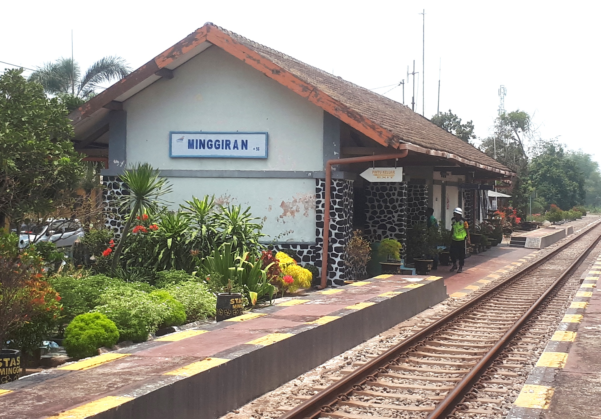 Stasiun Minggiran pada tahun 2019.